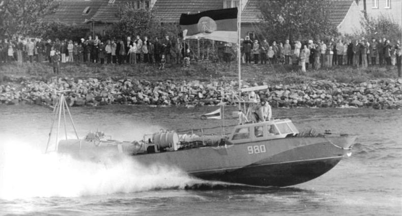 Rostock, 25. Jahrestag DDR-Gründung, Flottenparade ADN-ZB Sindermann 7.10.74 Rostock: 25. Jahrestag - Flottenparade der NVA Leichtes Torpedoschnellboot des Truppenteils "Fritz Globig". Alle Besatzungen dieses Truppenteils erreichten bei der Erfüllung der diesjährigen Gefechtsaufgaben einen Notendurchschnitt von 1,22. [Rostock.- Leichtes Torpedoschnellboot (LTS-Boot), Projekt 63 "Iltis"-Klasse (Kennung "980")]